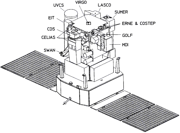 SOHO (Solar and Heliospheric Observatory) - Schemazeichnung public domain